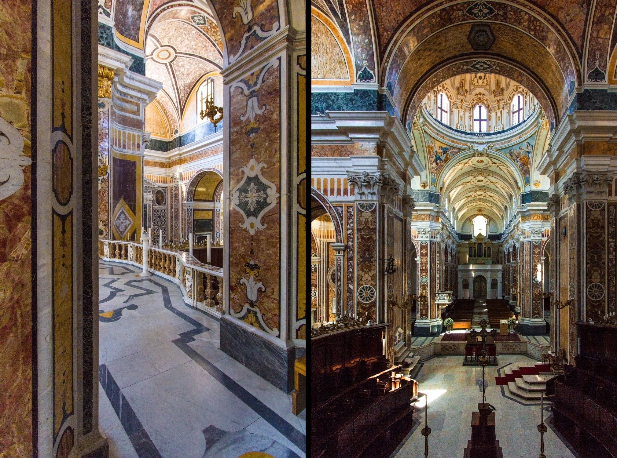 Basilica concattedrale di Maria Santissima della Madia, Monopoli